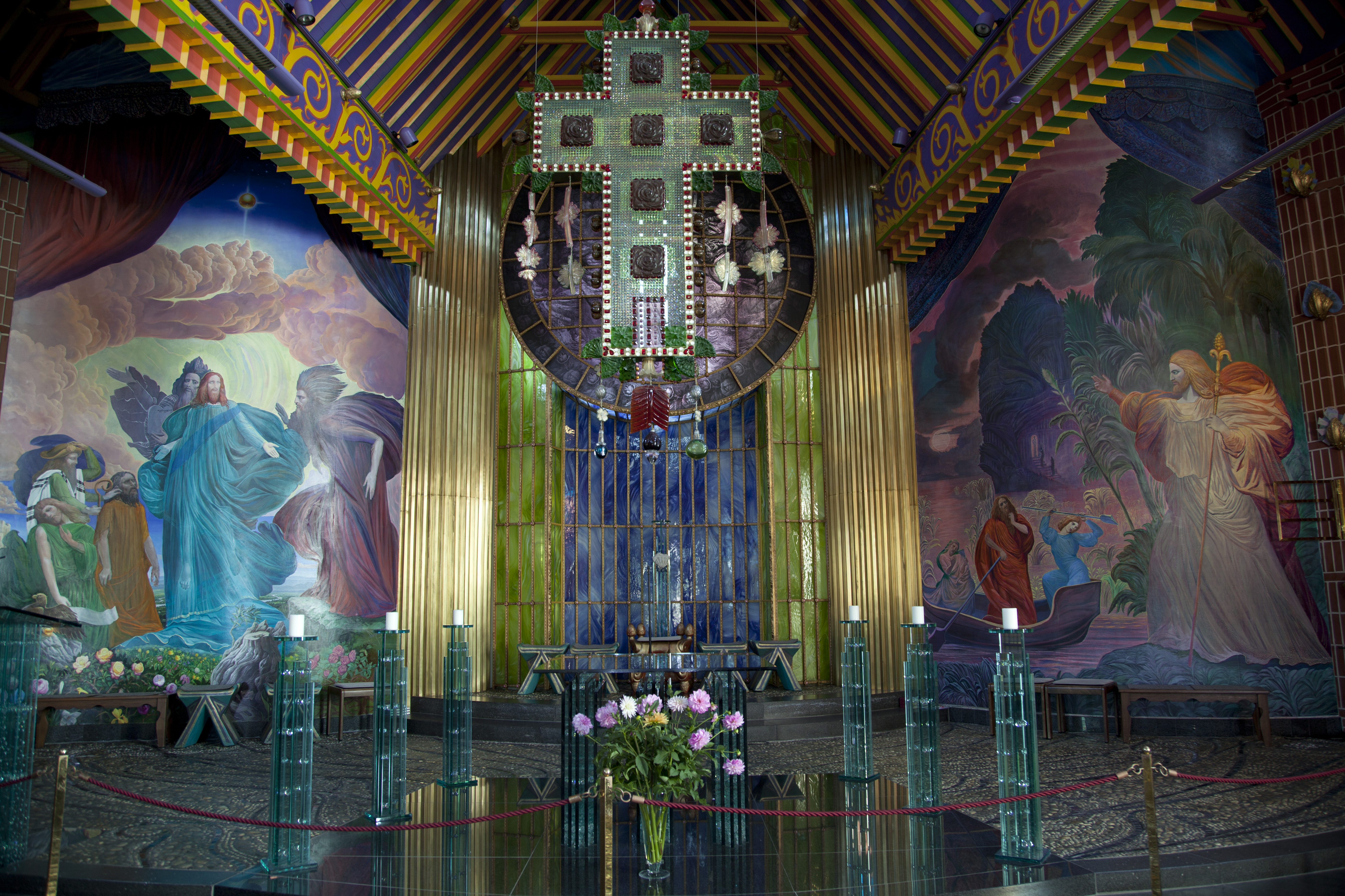 Kath. Pfarrkirche hl. Jakobus der Ältere und ehem. Friedhof